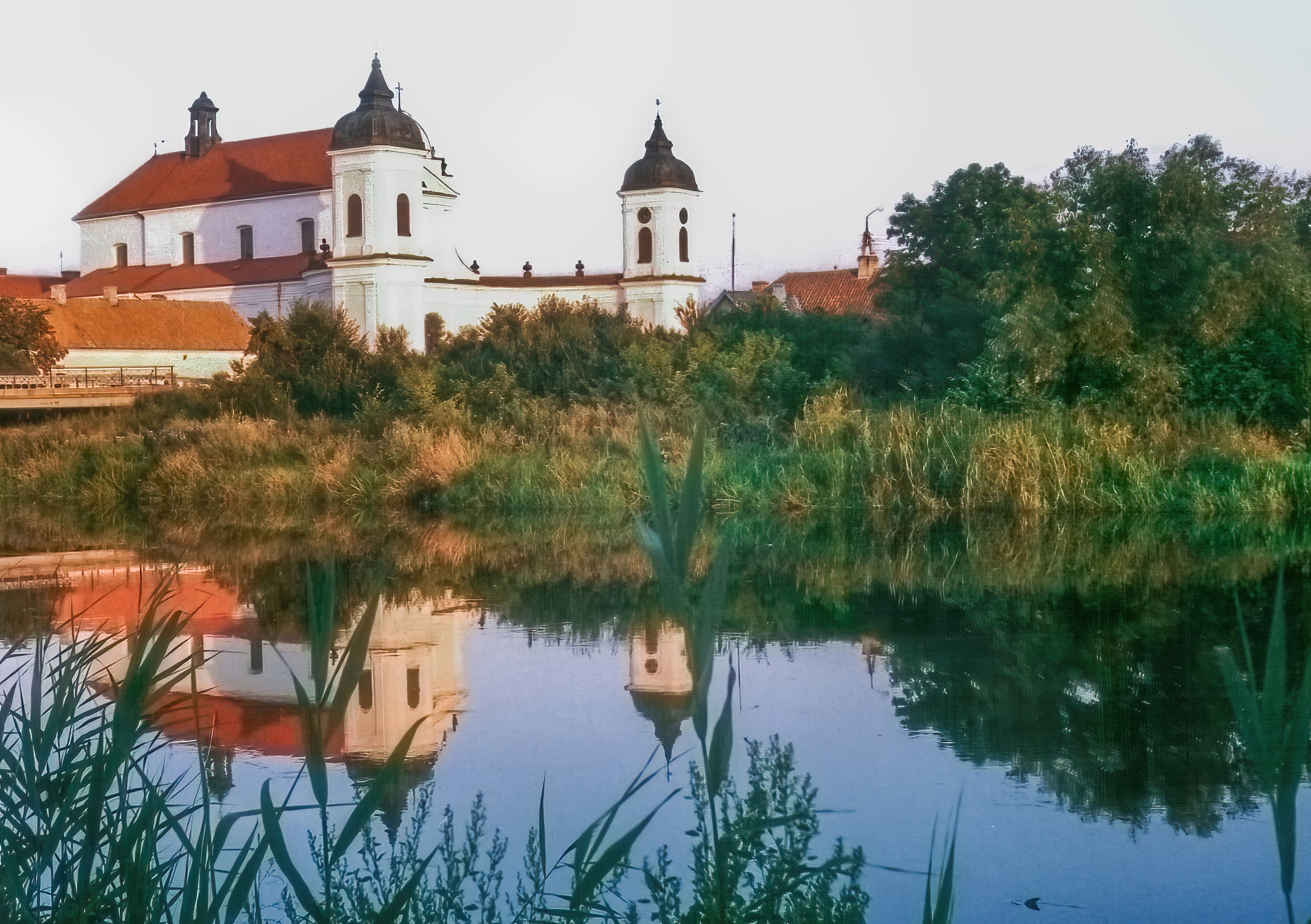 autor: Stimoroll tytuł: Kościół pod wezwaniem Świętej Trójcy w Tykocinie